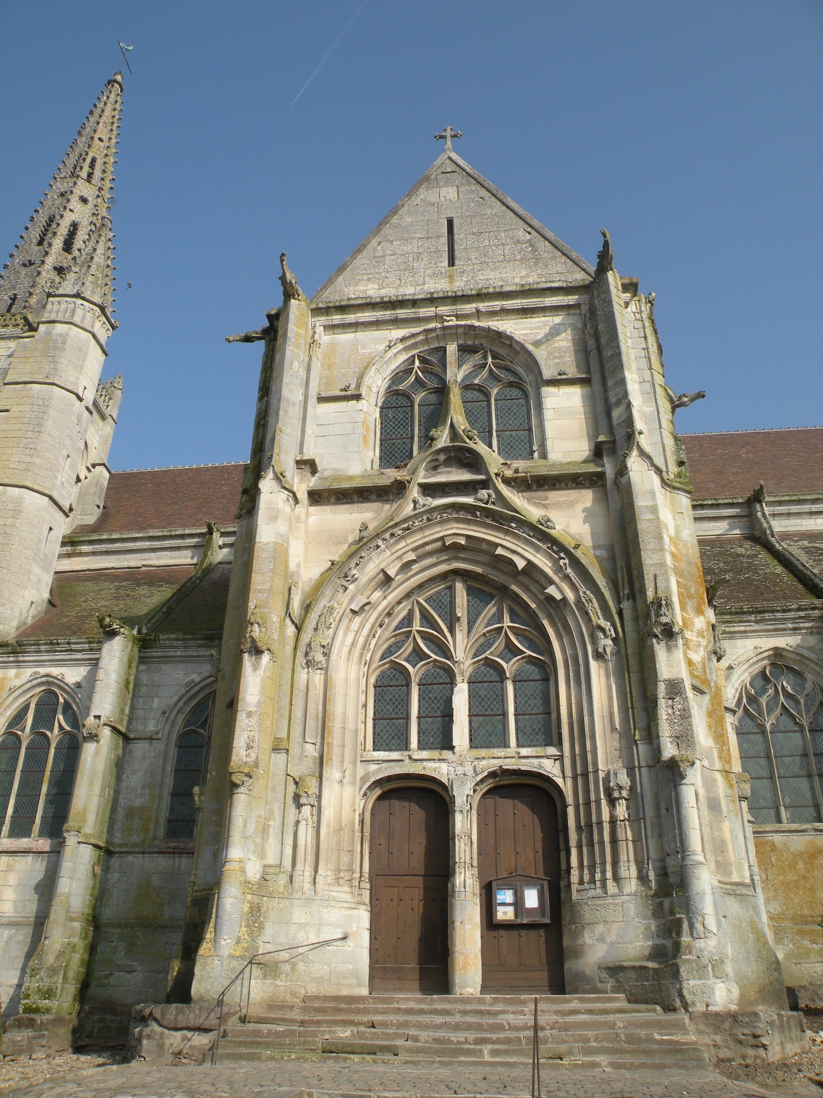 Église Saint-Pierre-et-Saint-Paul de Baron